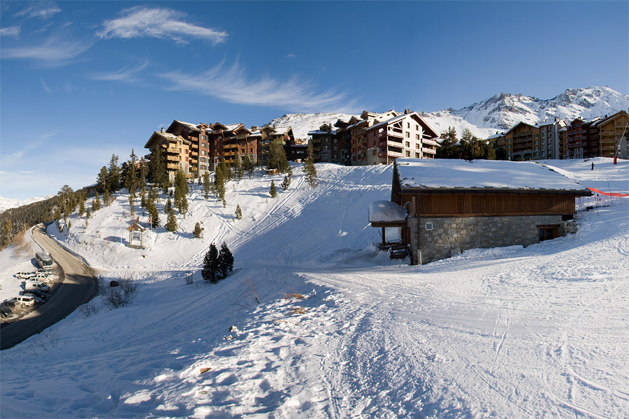 Arcs 1950